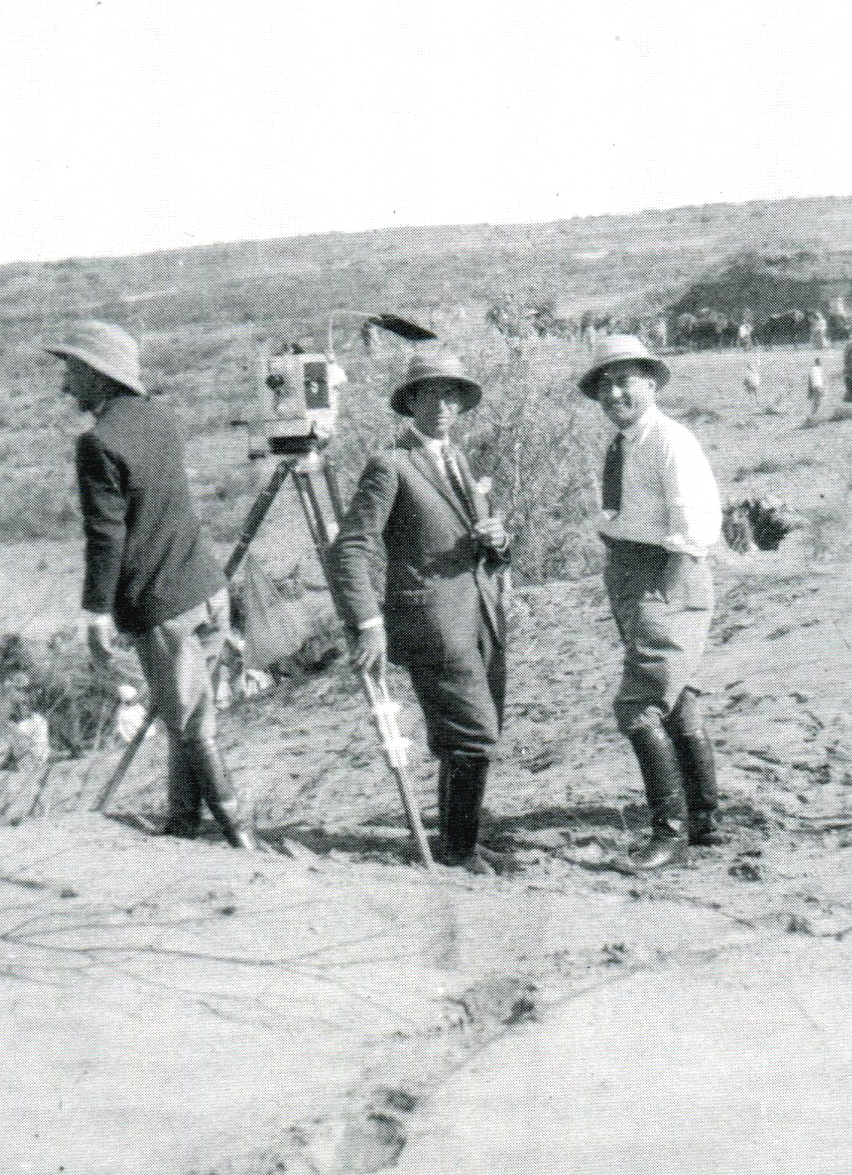 Kif Tebbi regia di Mario Camerini - produz. A.D.I.A Roma, - foto del regista e di alcuni tecnici della troupe sul set nel deserto libico - maggio 1928